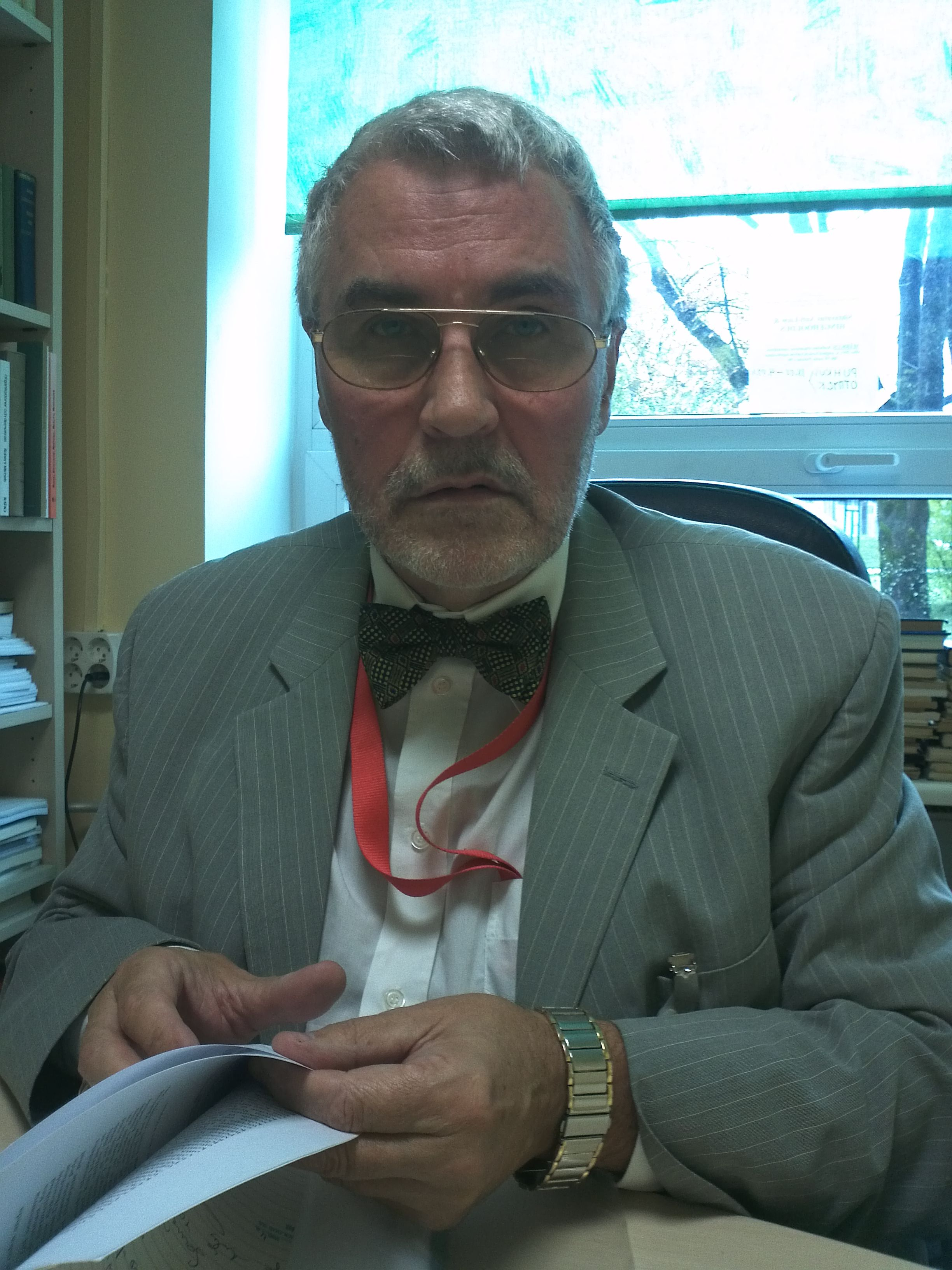 Eesti psühhiaater ja poliitik Anti Liiv.